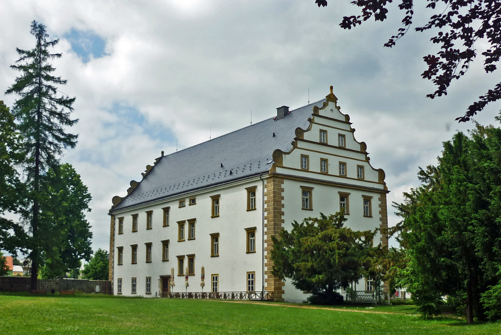 Schloss Schluckenau (Šluknov) in Nordböhmen